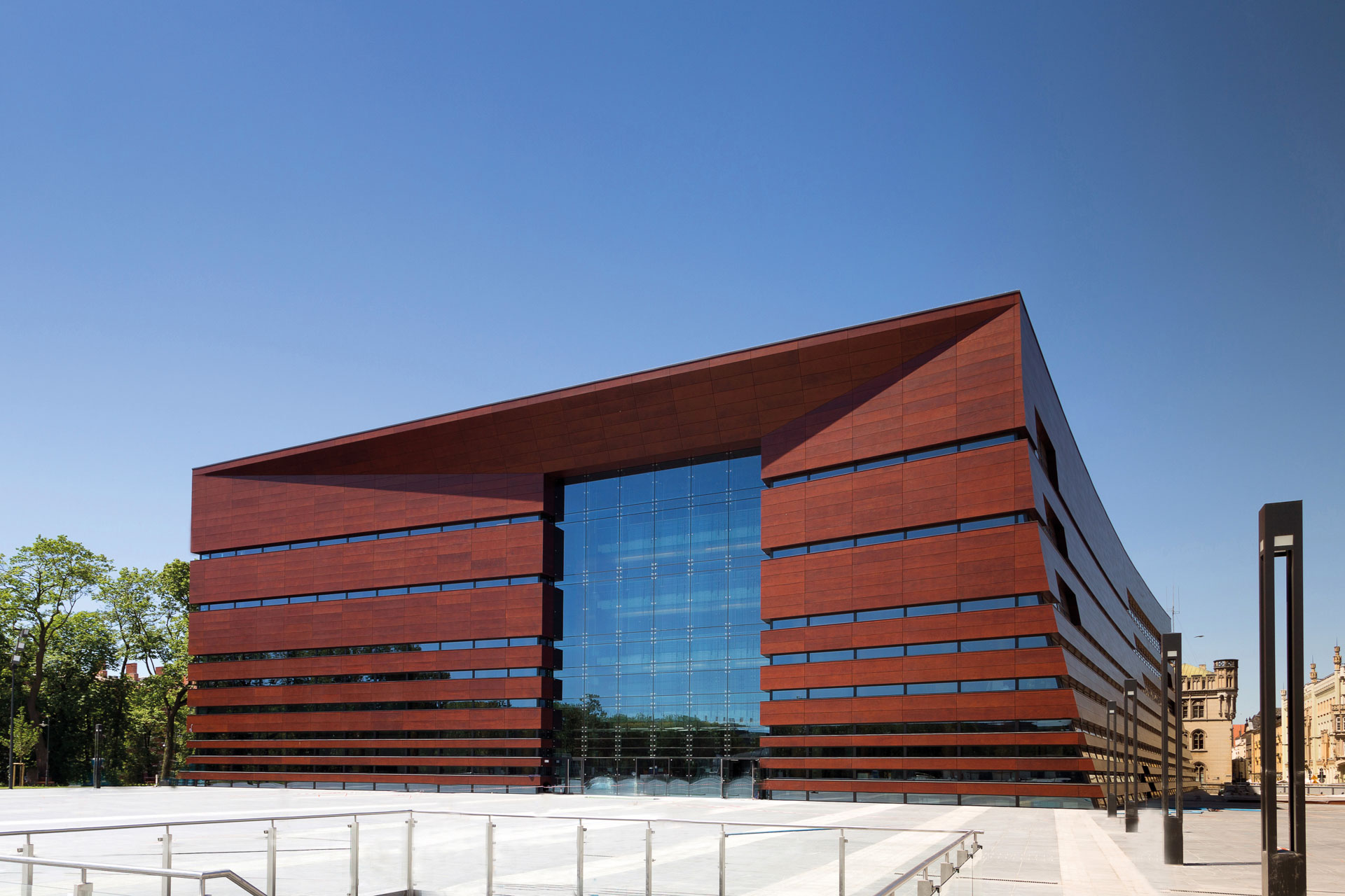 Narodowe Forum Muzyki im. Witolda Lutosławskiego we Wrocławiu